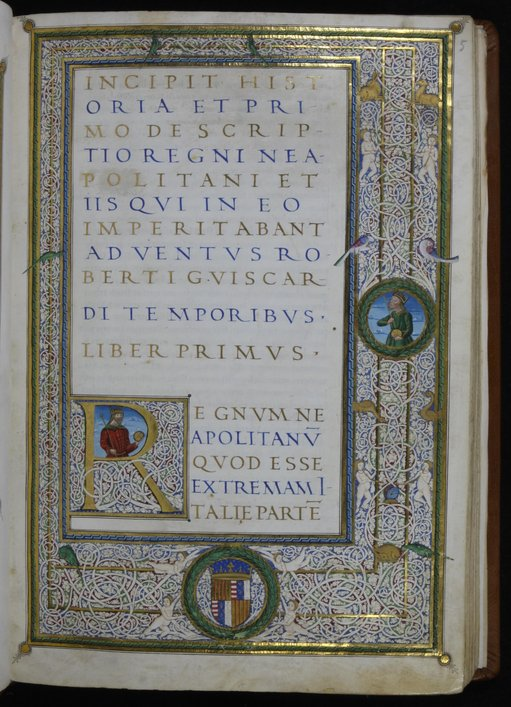 Orla amb escut reial de Nàpols, miniatura dins de medalló de llorer: rei amb ceptre i globus. Caplletra historiada: rei amb ceptre i globus